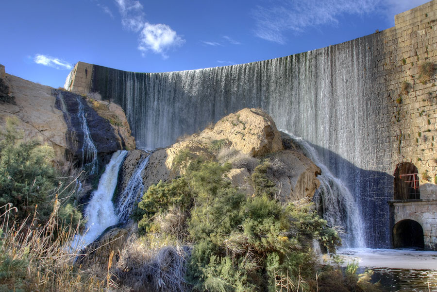 Pantano de Elche